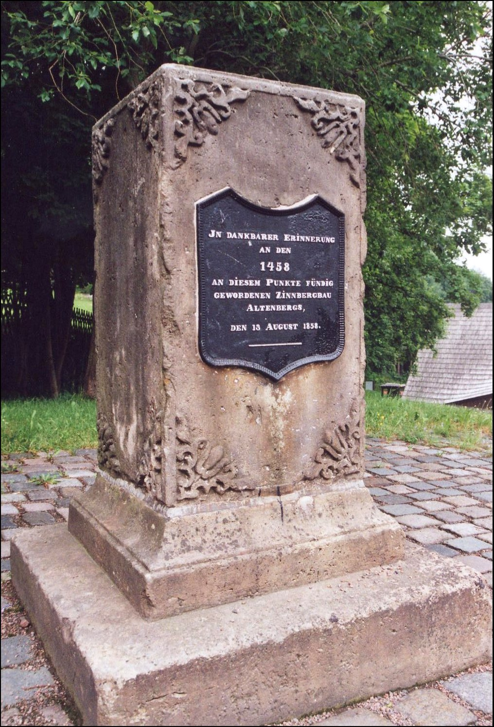 Altenberg (Erzgebirge): Bergbaudenkmal. Die Inschrift lautet: "In dankbarer Erinnerung an den 1458 an diesem Punkte fündig gewordenen Zinnbergbau Altenbergs, den 13. August 1858." Der heutige Standort entspricht allerdings nicht mehr dem vom Tag der Aufstellung. Der Stein musste versetzt werden, da er ins Bruchfeld der Pinge geriet. Zudem datiert die Wissenschaft den Beginn des Zinnbergbaus heute auf etwa 1440.